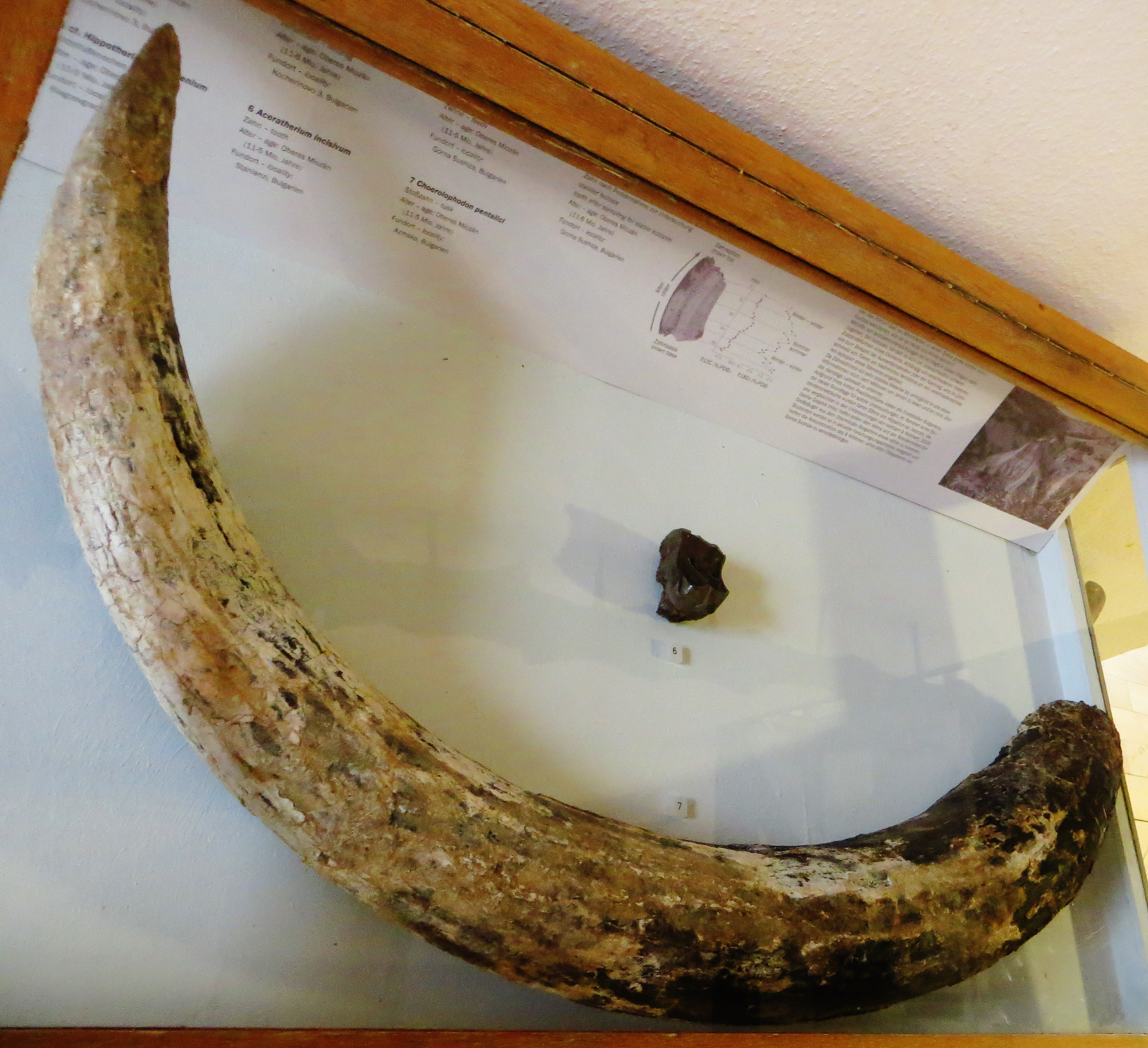 Fossil of Choerolophodon, an extinct mammal- Took the picture at Museum of Paleontology, Tuebingen